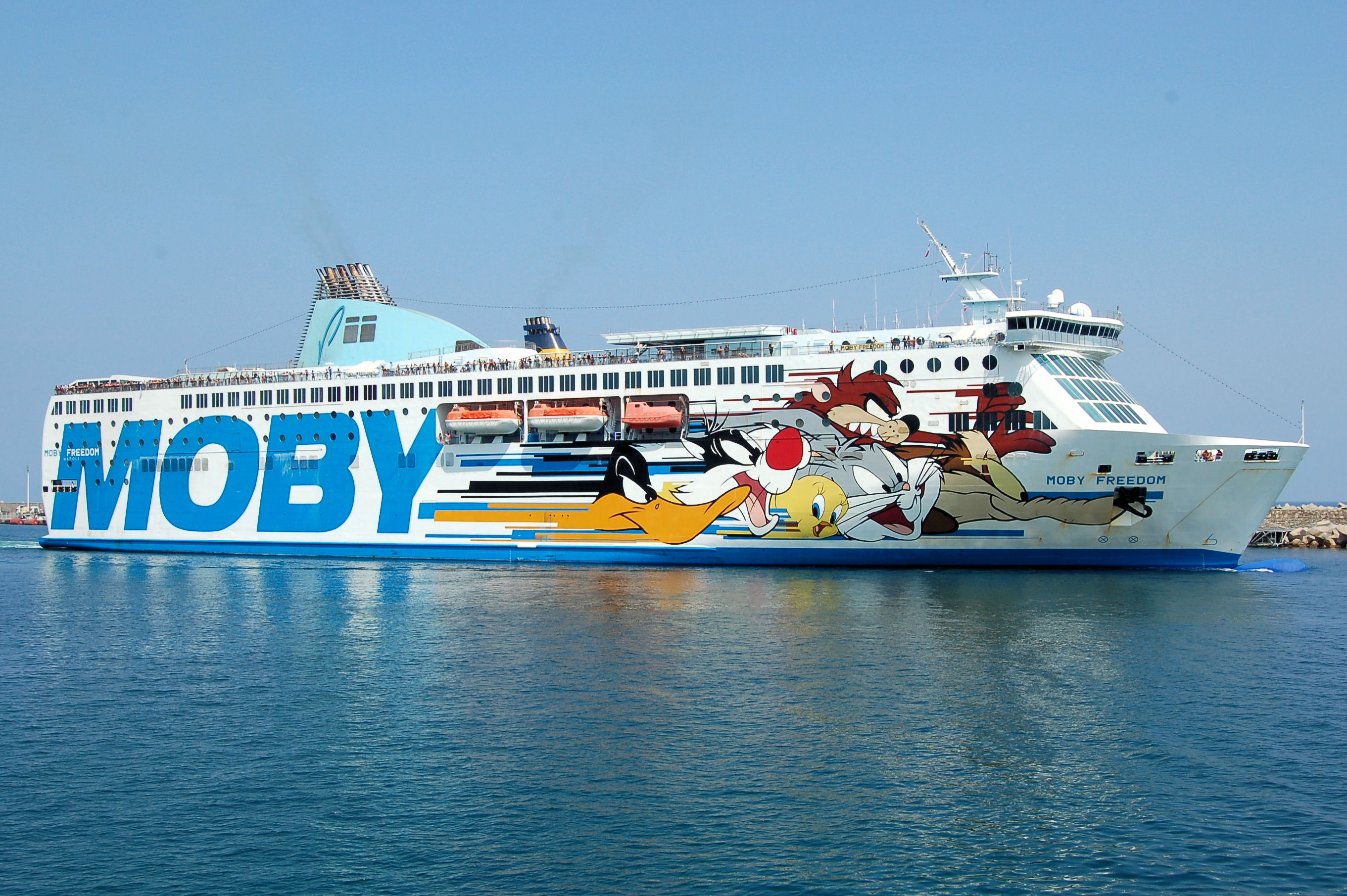 Moby Freedom dans le port de Bastia.